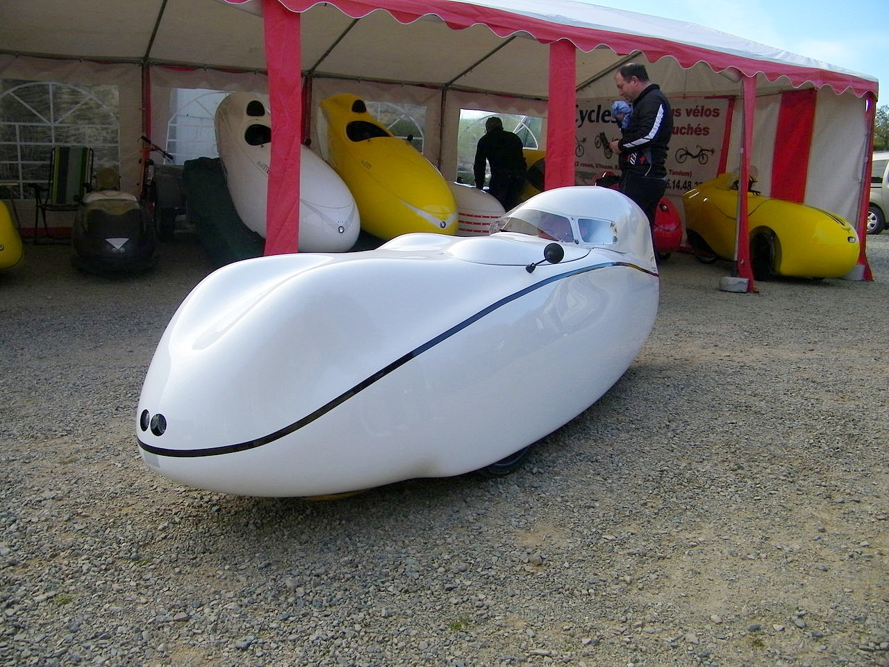 milan sl dans sa configuration fermée